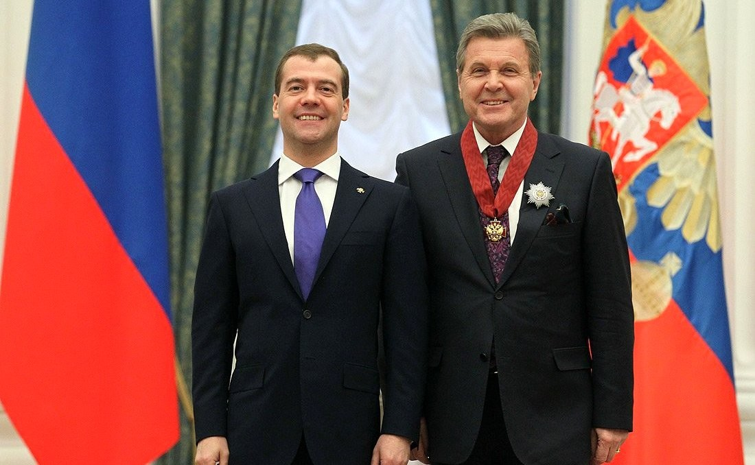 Дмитрий Медведев на церемонии вручения государственных наград. Орденом «За заслуги перед Отечеством» II степени награждён художественный руководитель Государственного театра эстрадных представлений «Музыкальное агентство» Лев Лещенко